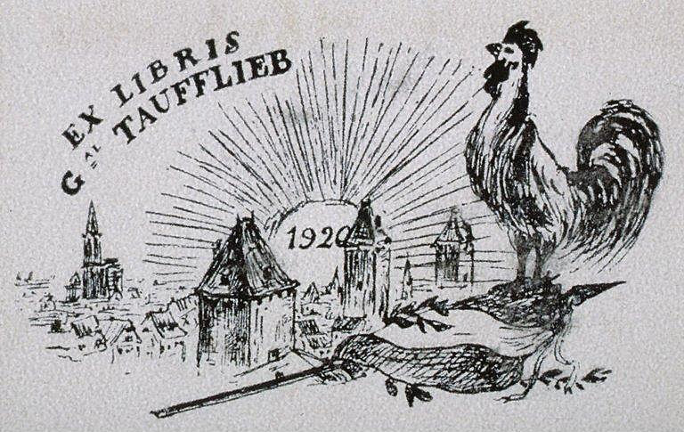 Ex-Libris Général Taufflieb. 1920. Bibliothèque nationale et universitaire de Strasbourg